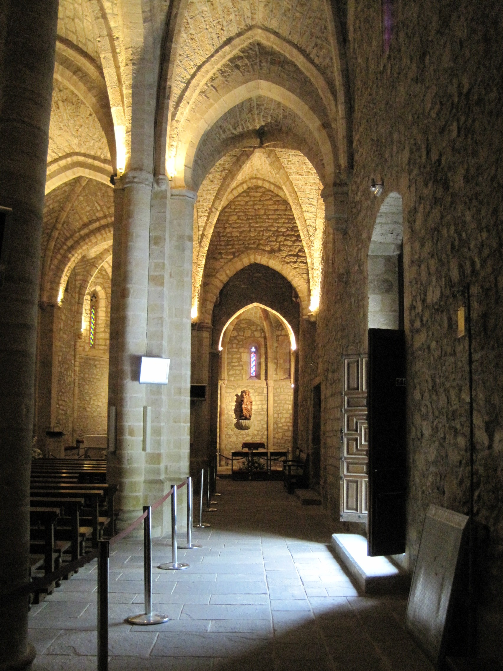 Nave lateral de la iglesia del monasterio de Santo Toribio de Liébana (Cantabria, España).